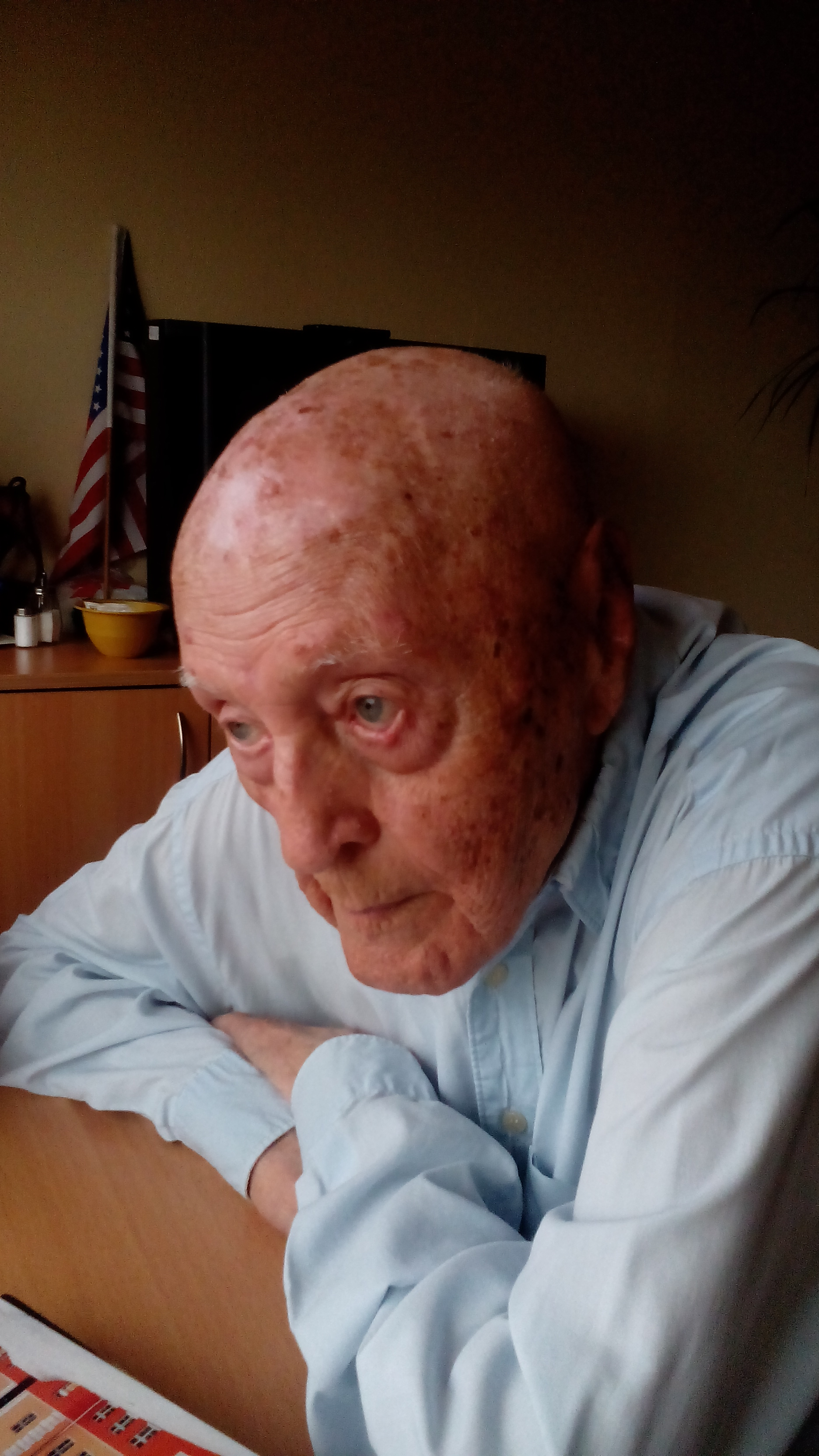 Барыс Кіт ва ўзросце 105 гадоў у доме састарэлых у Франкфурце-на-Майне